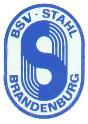 Logo BSV Stahl Brandenburg 1991-1992